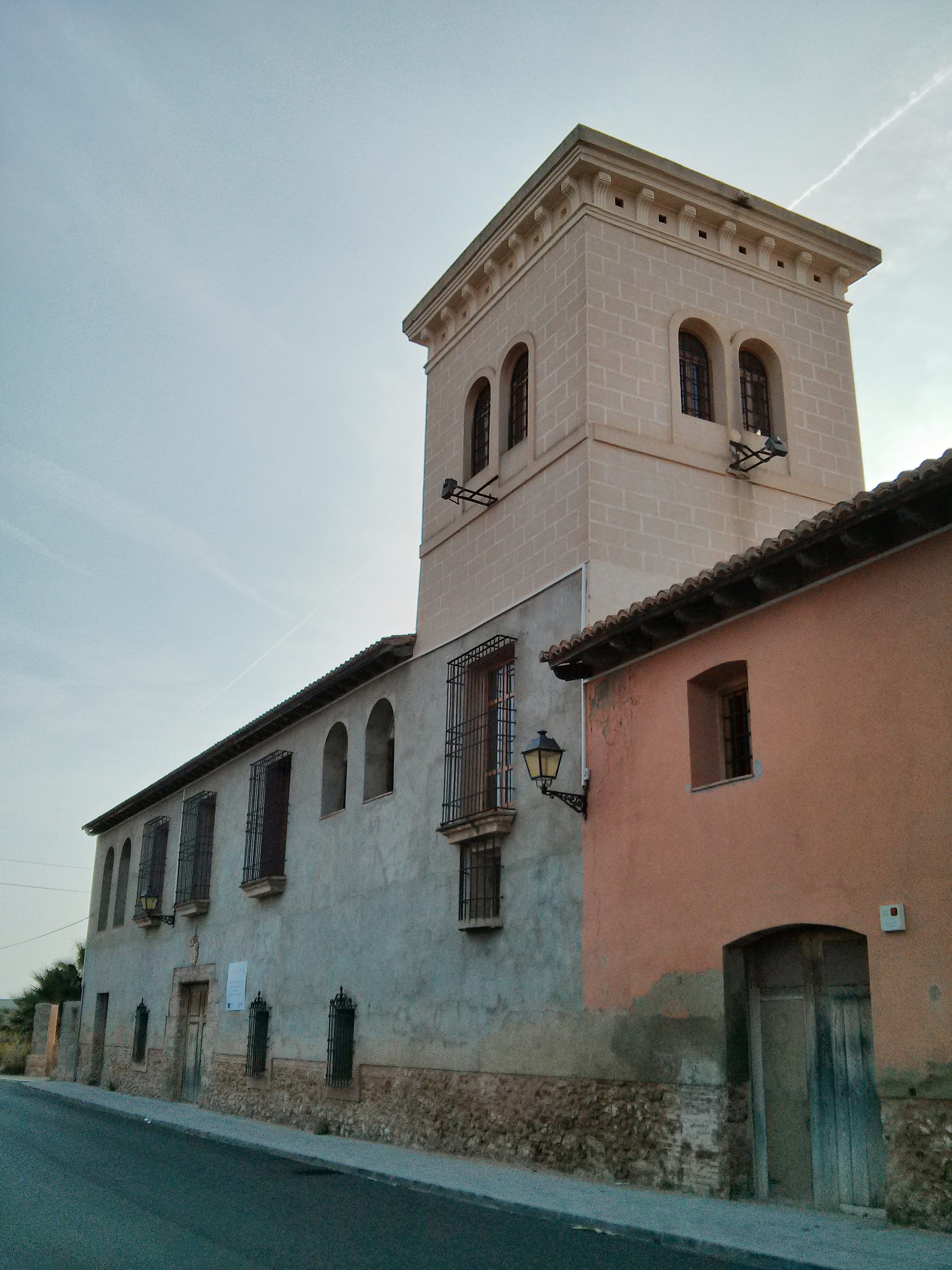 La Torre del Virrey , también llamada Torre Baba, forma parte de una finca que se halla a poco más de medio kilómetro del núcleo urbano de La Eliana, en la comarca de El Campo del Turia, de la provincia de Valencia; junto a la vía del ferrocarril y el límite con el municipio de La Puebla de Vallbona. Está catalogada como Bien de interés cultural, con anotación ministerial número R-I-51-0010675 y fecha de anotación 27 de agosto de 2001.